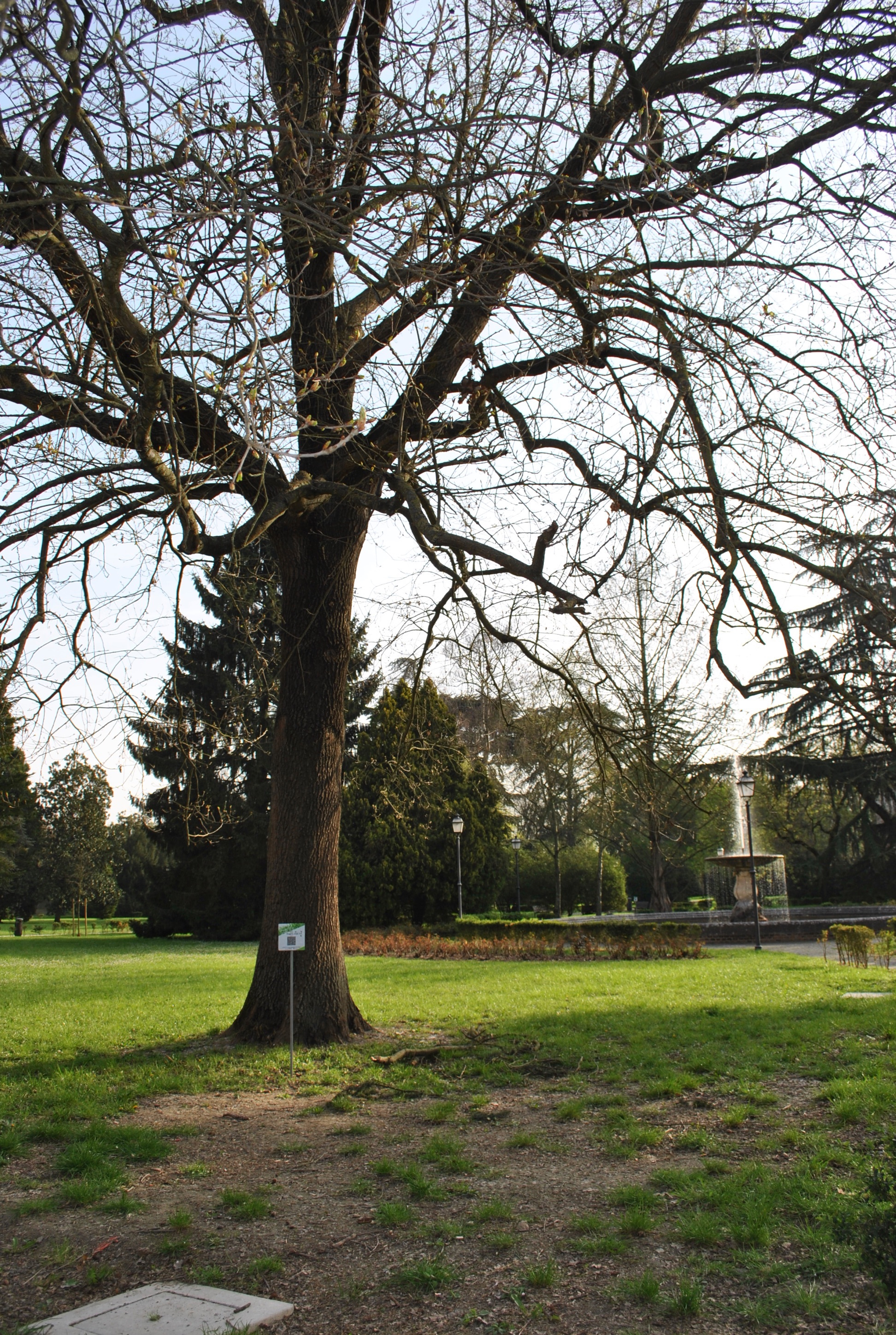 Farnia parco Massari - Ferrara